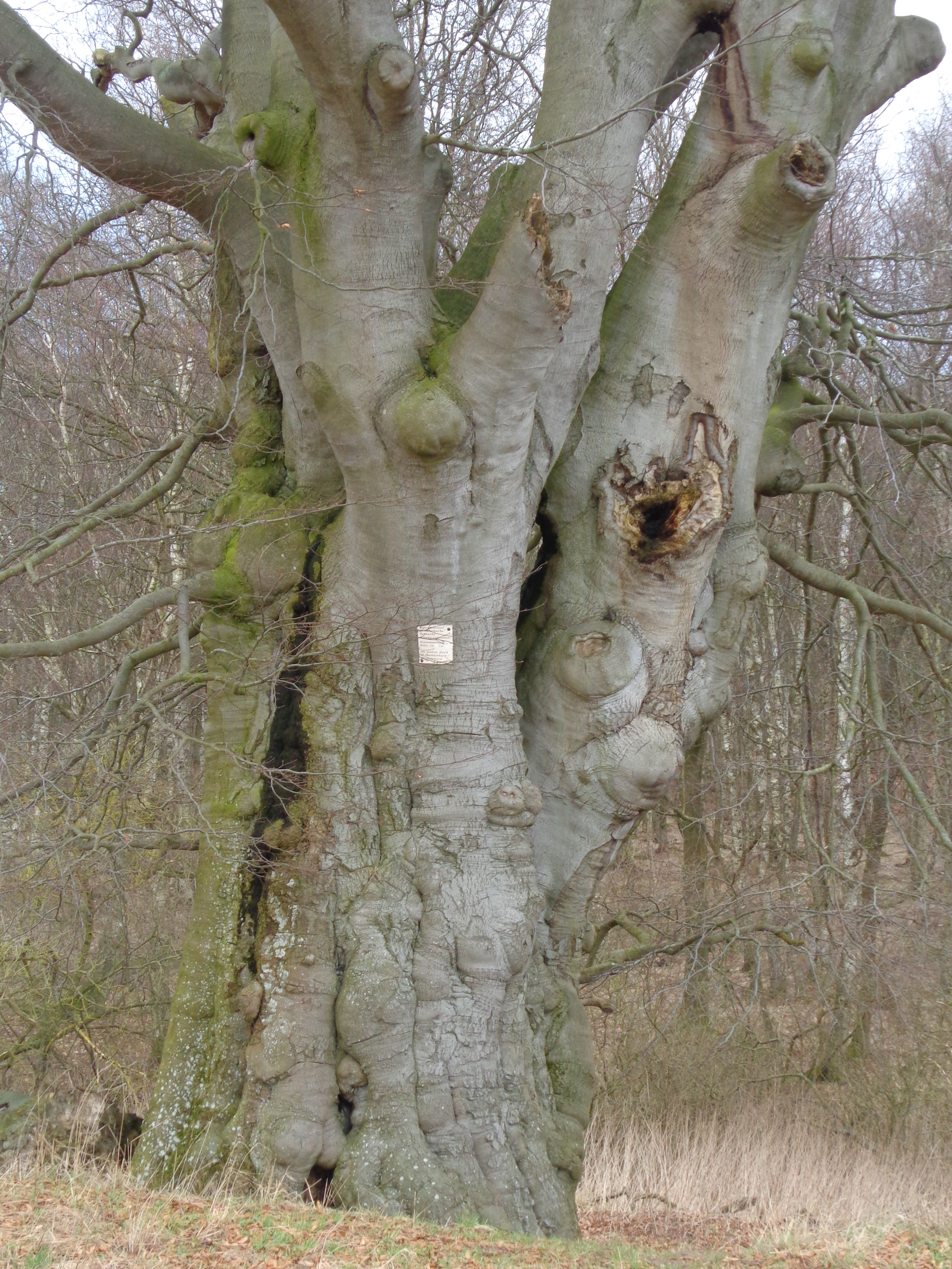 Sterbende Schäferbuche bei Neu Dobbin, mit 8,10 m Umfang die dickste Buche in Mecklenburg, etwa 200 Jahre alt.